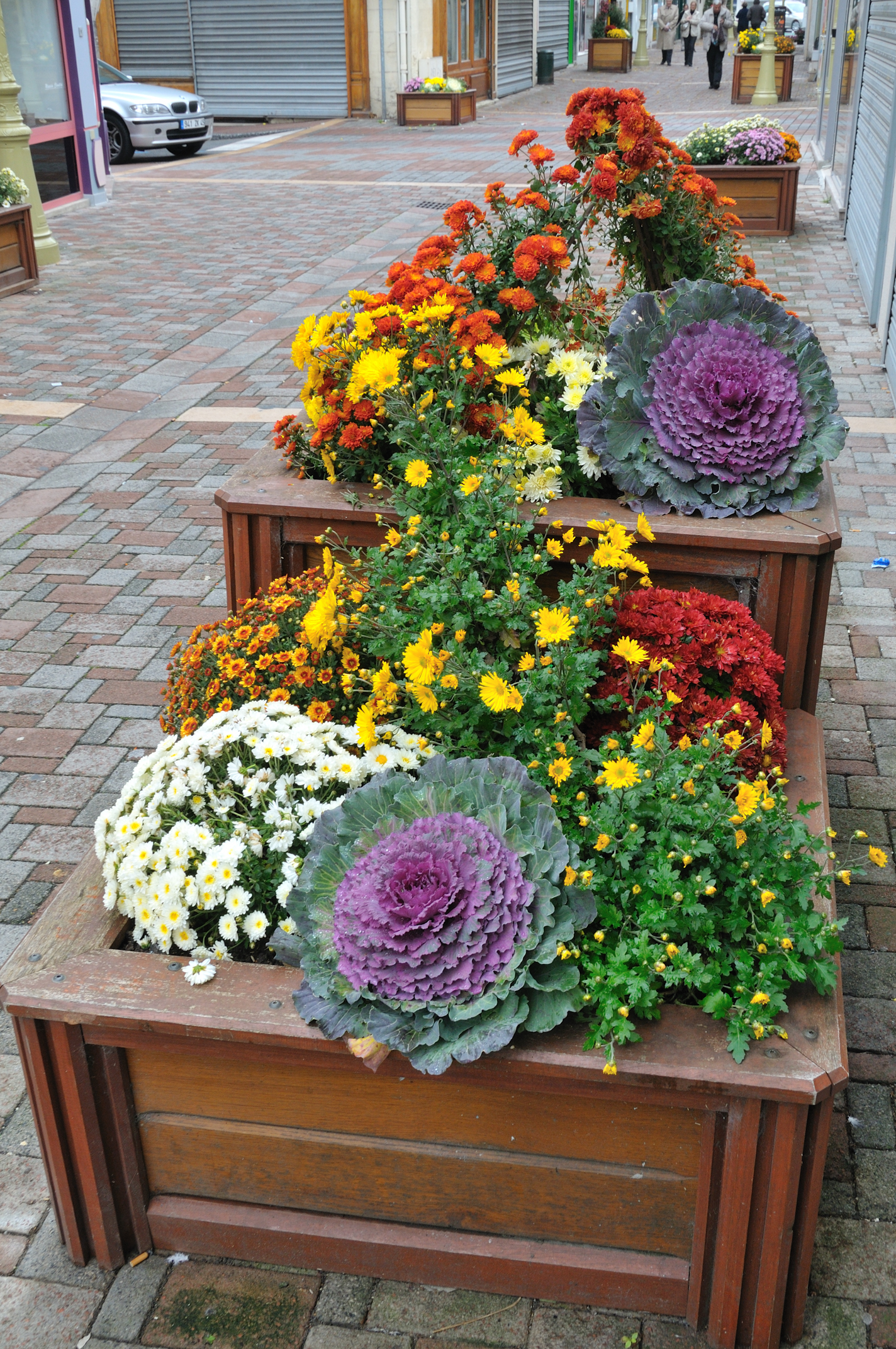 Décoration florale rue de la Couronne, Pithiviers, Loiret, France